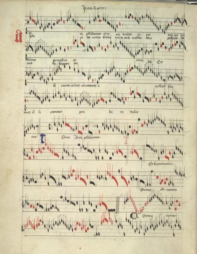 Modena: Biblioteca Estense e Universitaria a.M.5.24